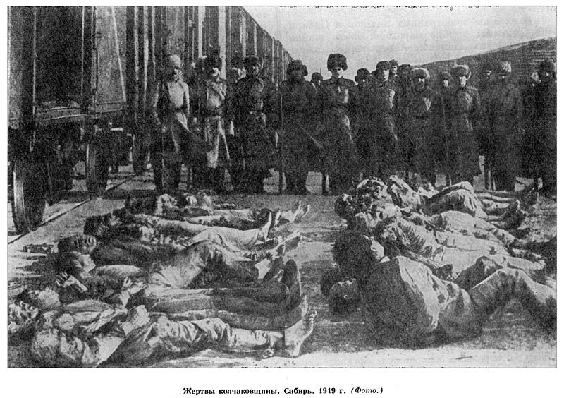 Жертвы колчаковцев на железнодорожной станции. Сибирь, зима 1919 года.